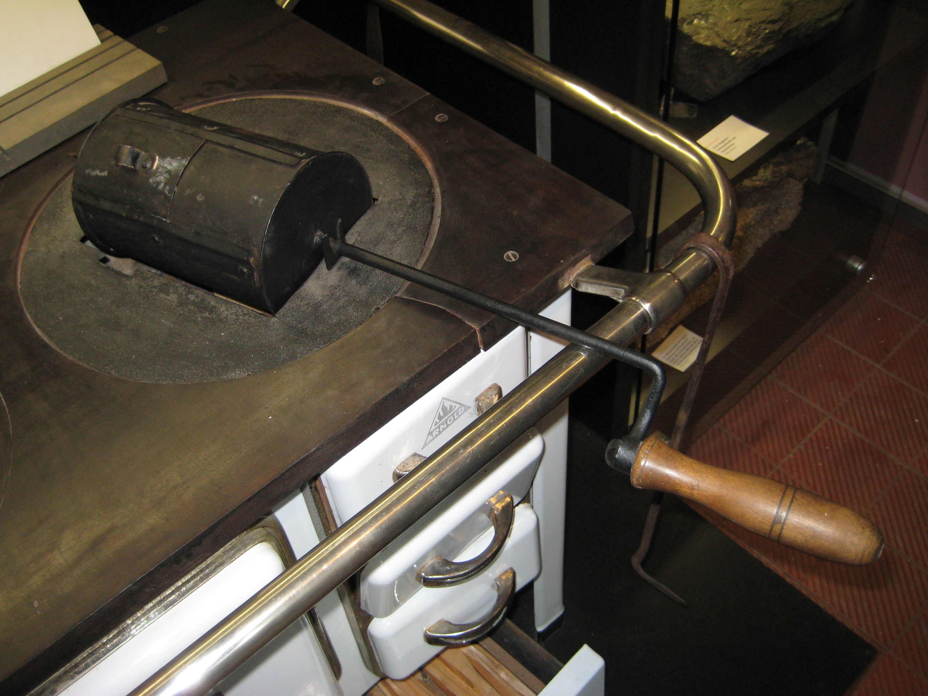 Alter Kaffeeröster, für Herdbetrieb über offenem Feuer